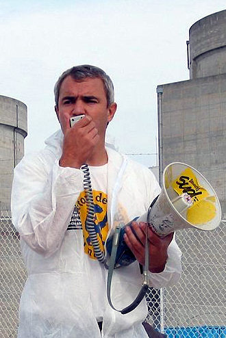 Stéphane Lhomme